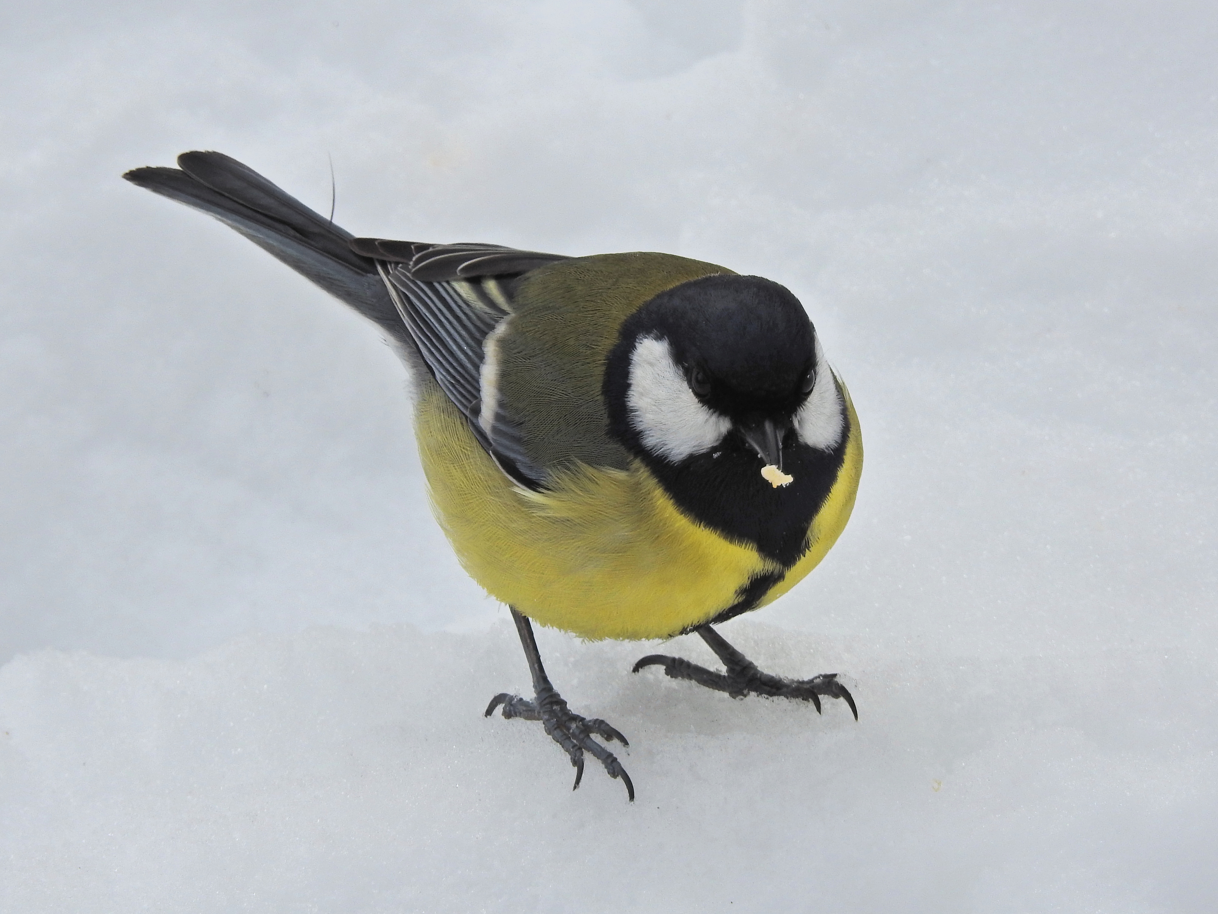 great tit Kohlmeise piţigoi mare